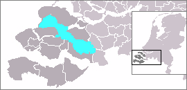 Escaut oriental